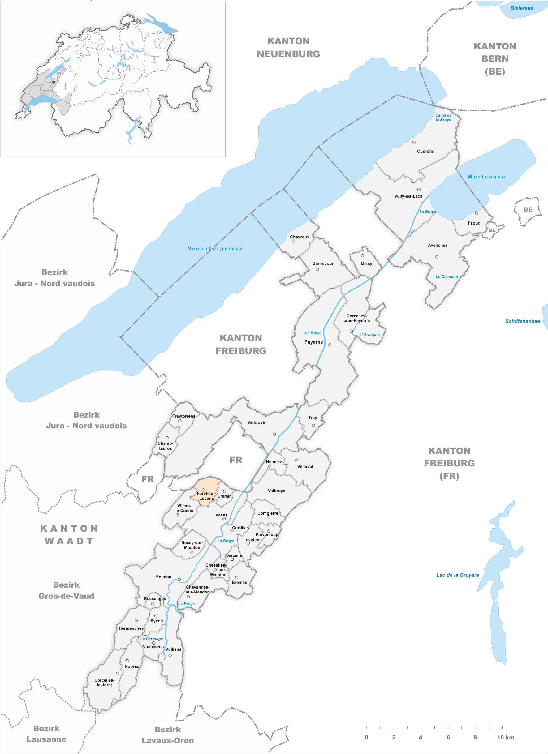 Municipality Forel-sur-Lucens